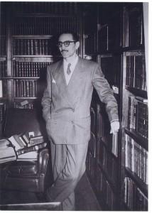 Risieri Frondizi, rector de la UBA.